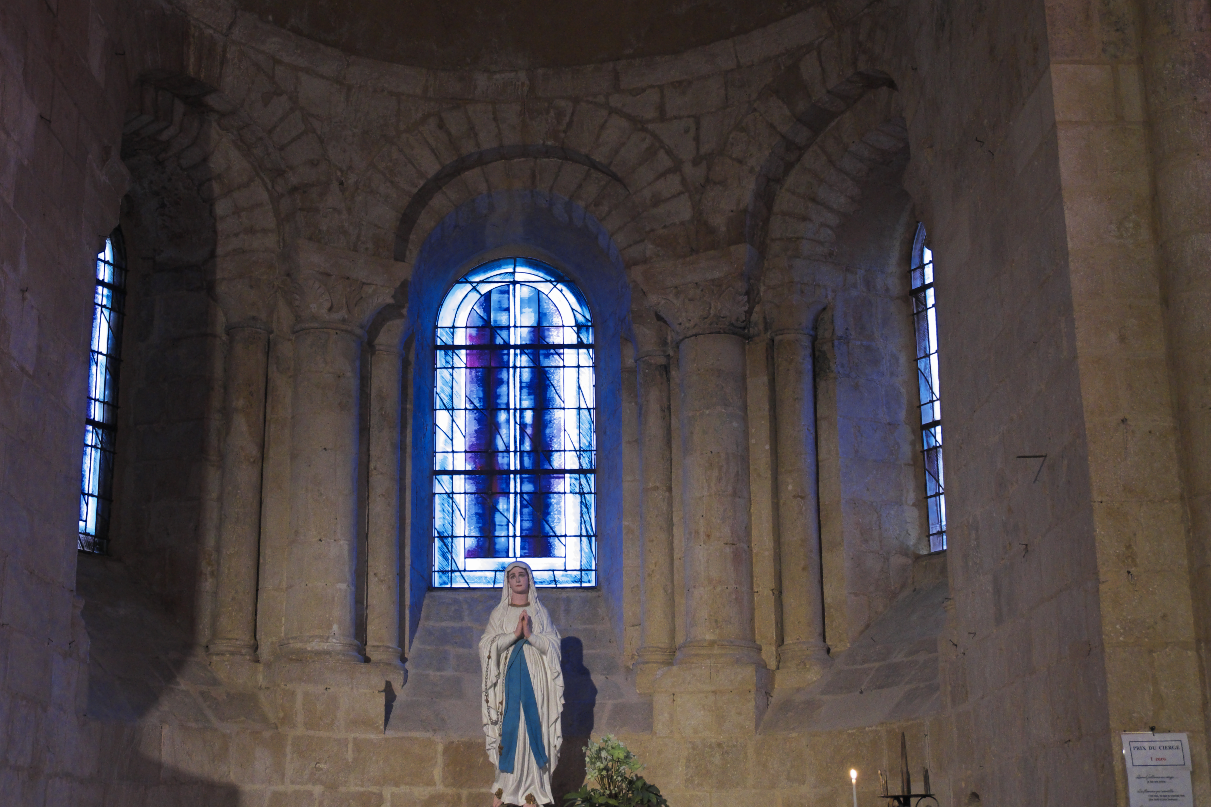 Katholische Kirche Saint-Jean-Baptiste in Jazeneuil im Département Vienne (Nouvelle-Aquitaine/Frankreich), Chor